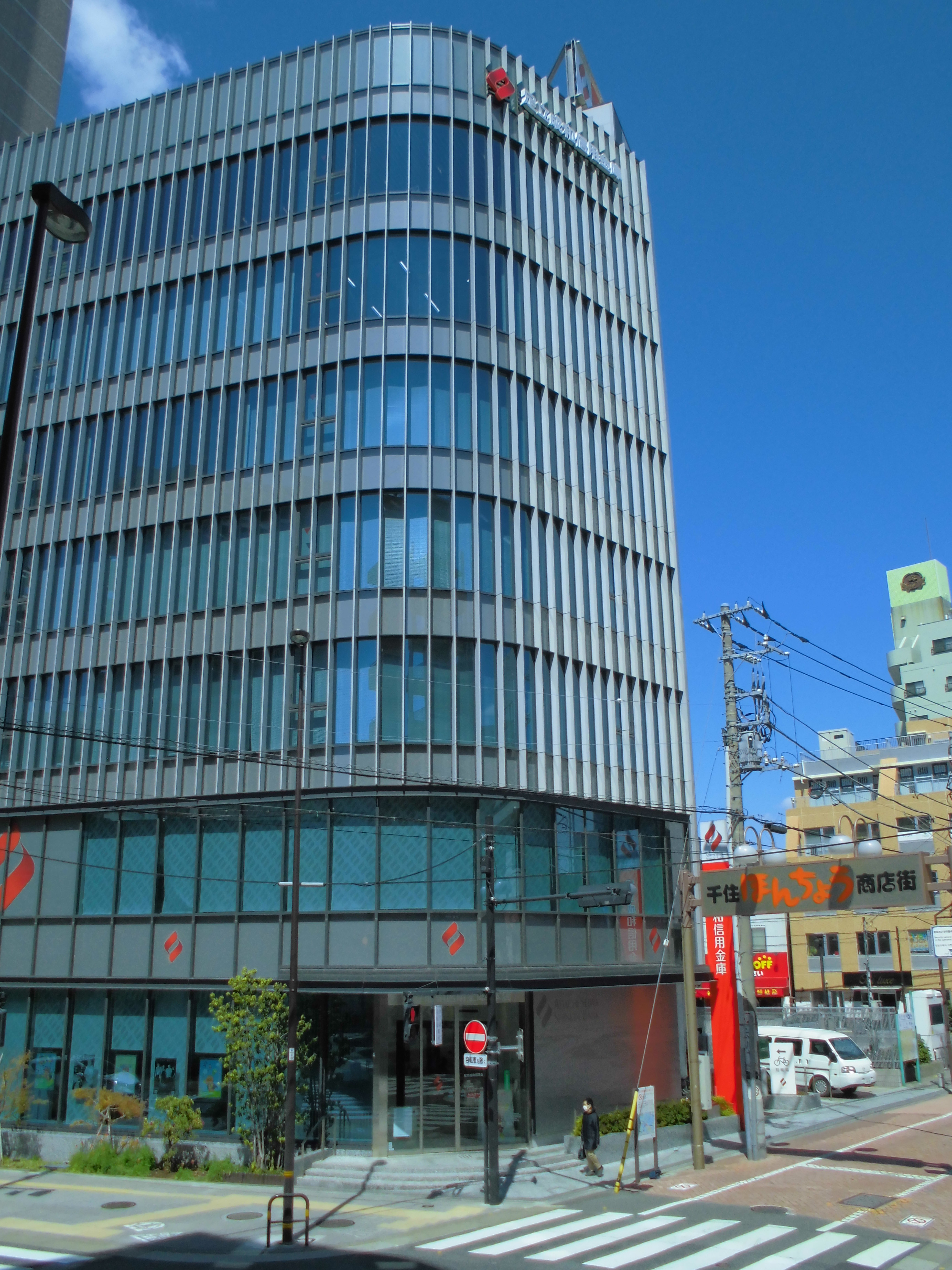 足立成和信用金庫本部・本店